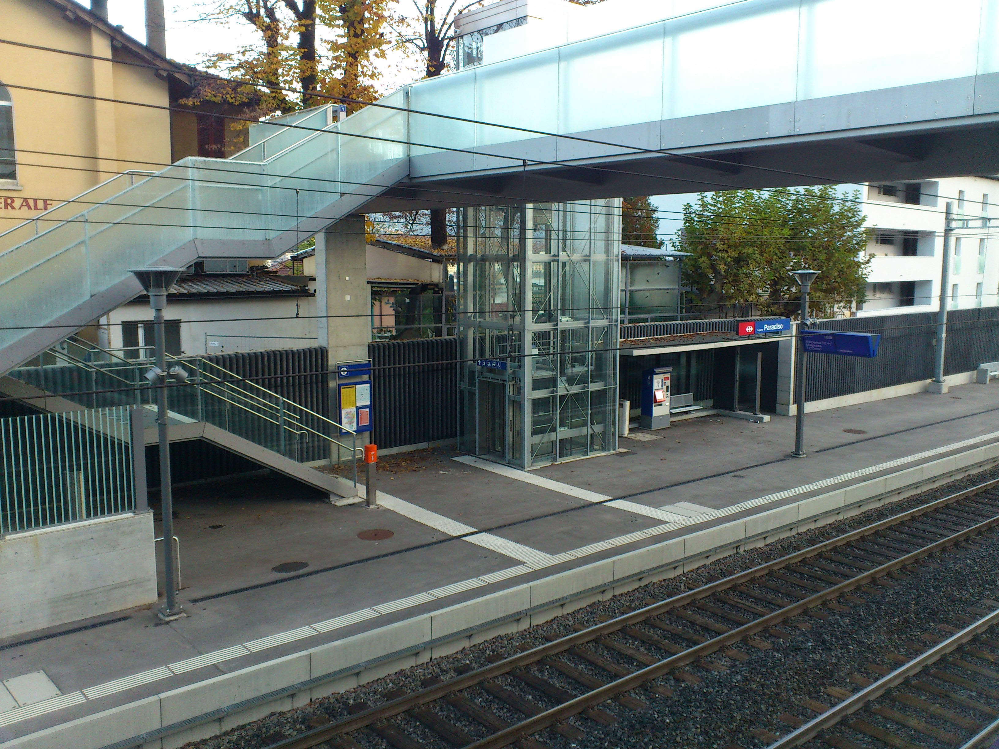 Lugano Paradiso: der neue Bahnhof